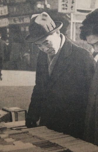 中谷宇吉郎